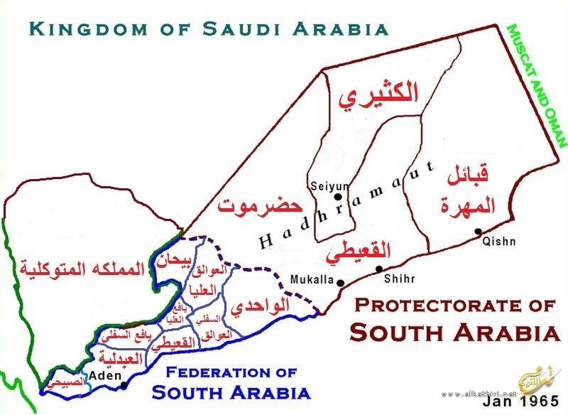 خريطة سلاطين القبائل في اليمن الجنوبي و جنوب اليمن و حضرموت و شبوة